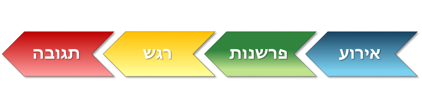 השלבים המרכיבים את מודל אפר"ת: אירוע, פרשנות, רגש, תגובה